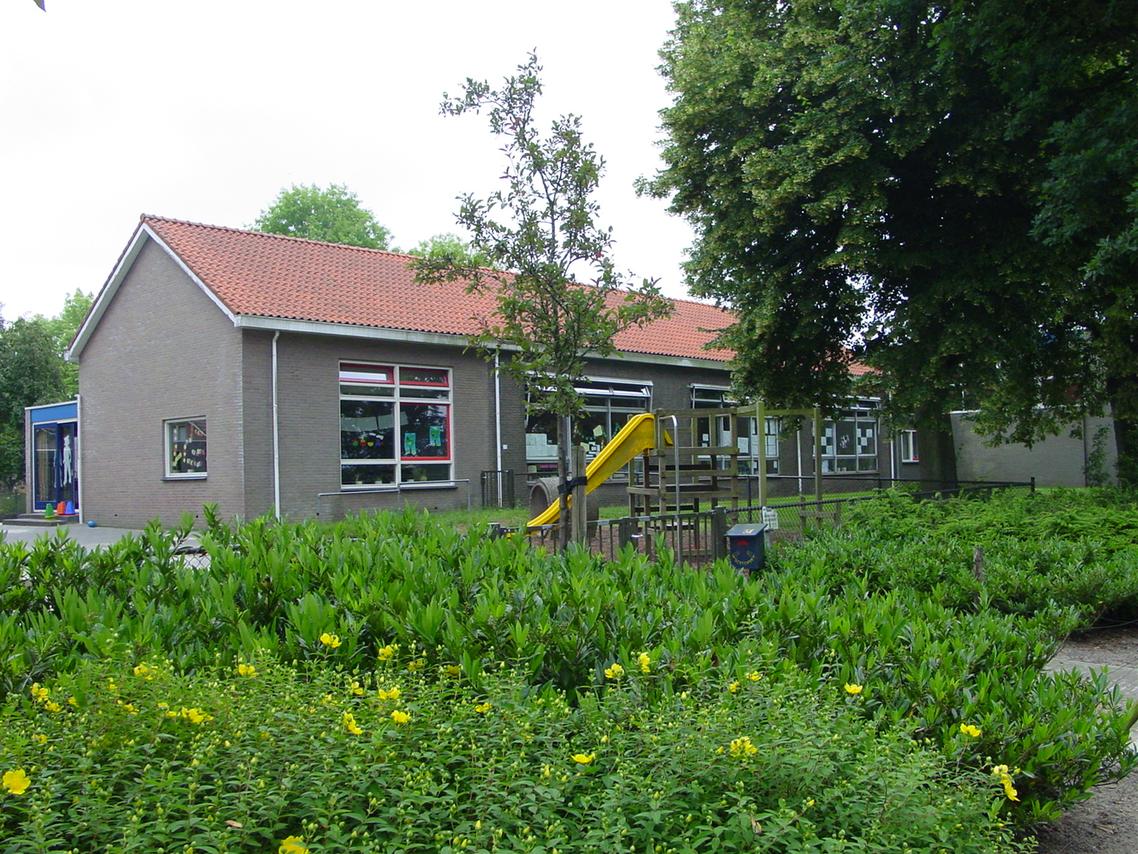 't Schienvat in Klijndijk (The Netherlands)